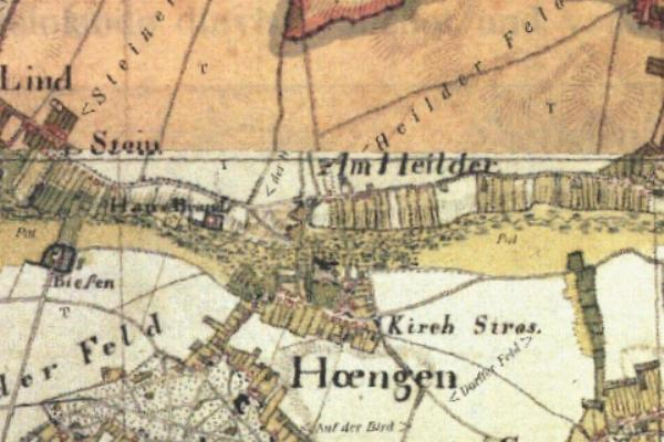 Kartenaufnahme der Rheinlande 1804/05